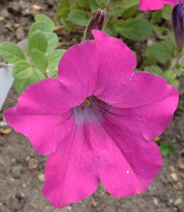 Pétunia Lavender Wave au Jardin des Plantes de Paris.